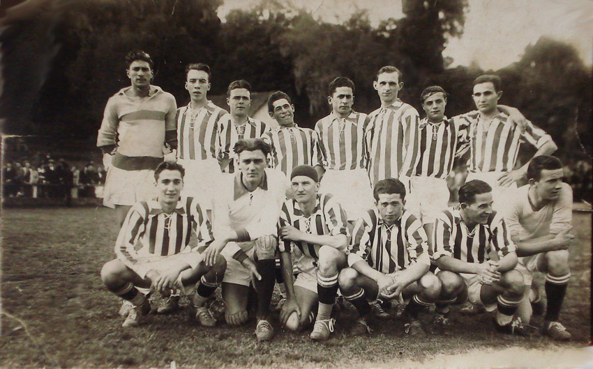 Equipe do Esporte Clube Juventude de Caxias do Sul no primeiro Fla-Ju. Estão na foto Vanzetti, Décio, Zito, Xispa, Alfredinho (Alfredo Jaconi), Bolacha, Bortinho, Longhi (Alcides Longhi), Mário, Renato e Garbin. A identificação de cada um não é clara, somente foram identificados com segurança Longhi e Alfredinho, respectivamente o primeiro e o quarto na fila da frente, contando da esquerda para a direita.